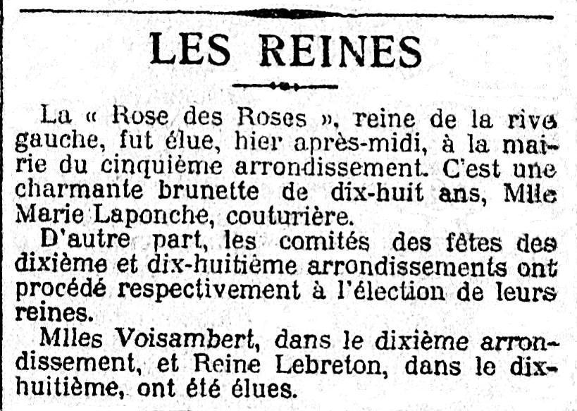 Annonce de l'élection de la première Rose des Roses de Paris (il en sera élu une en 1913 et une autre en 1914 et ce sera tout).